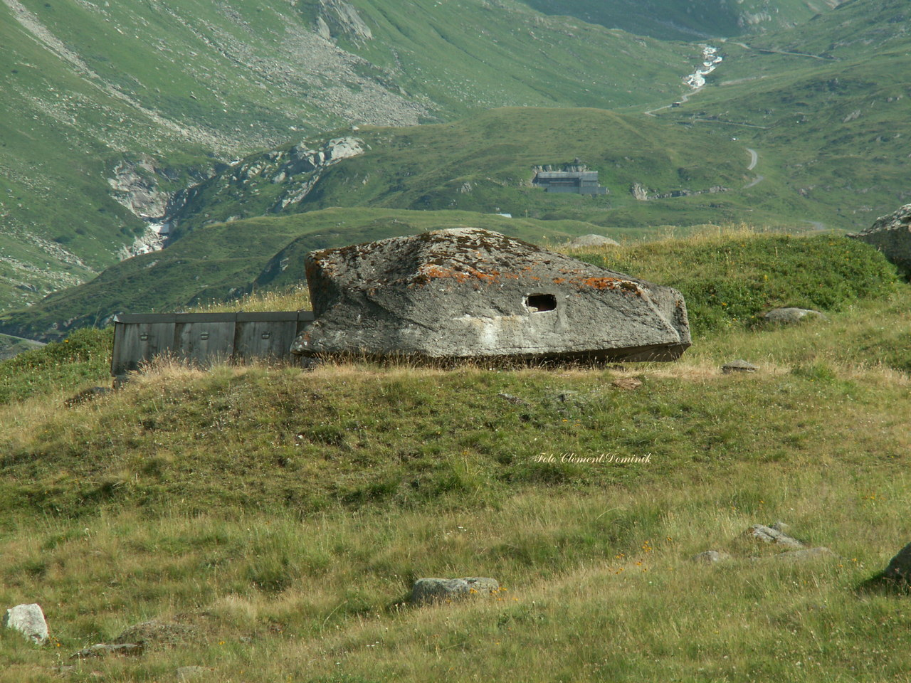 Turmkanone 1 Anlage Fuchsegg